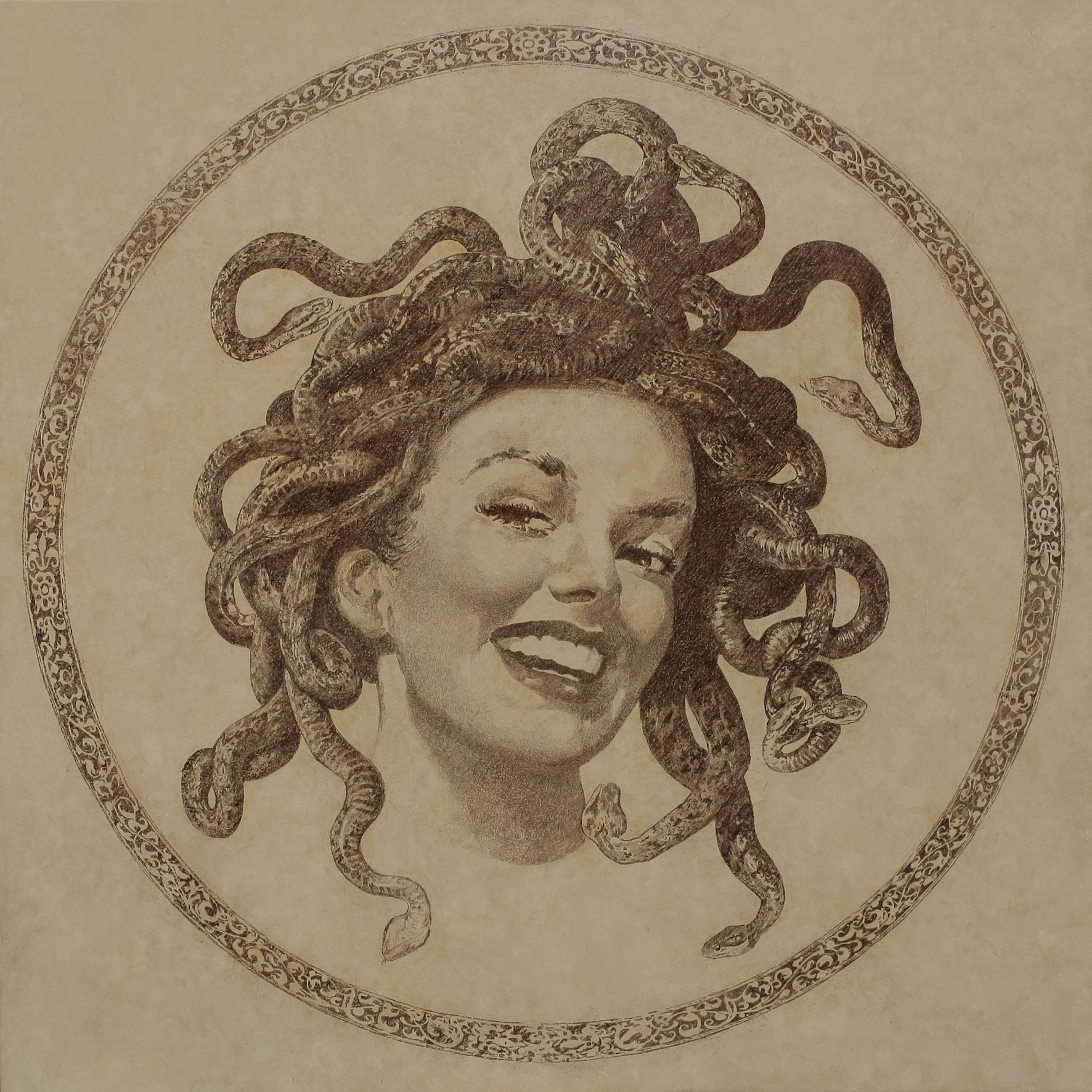 В. Колесников. Медуза. 80x80, 2016